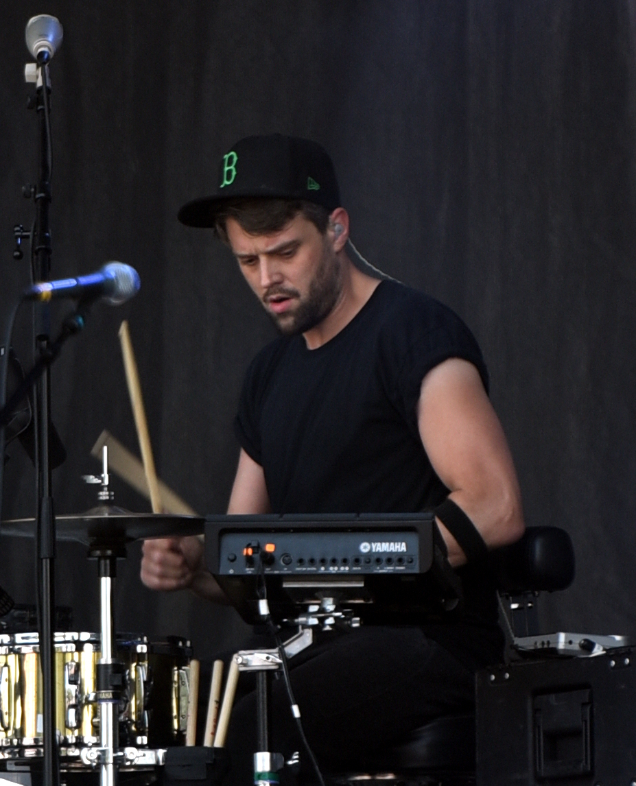 H-Blockx (Steffen "Steddy" Wilmking) beim Open Flair 2015 in Eschwege.